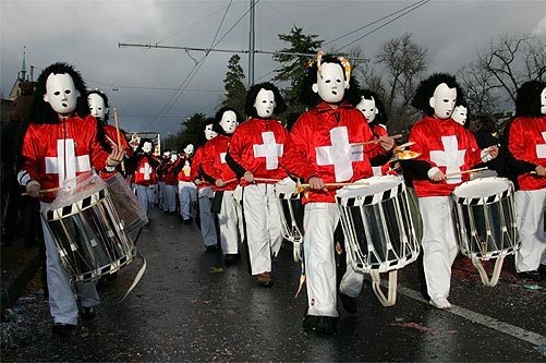 Basler Fasnacht 05